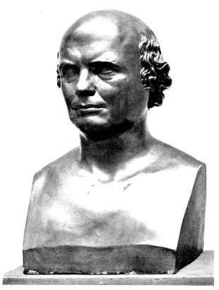 Joseph Maria Christen (1767–1838): Franz Xaver Bronner (1758–1850).